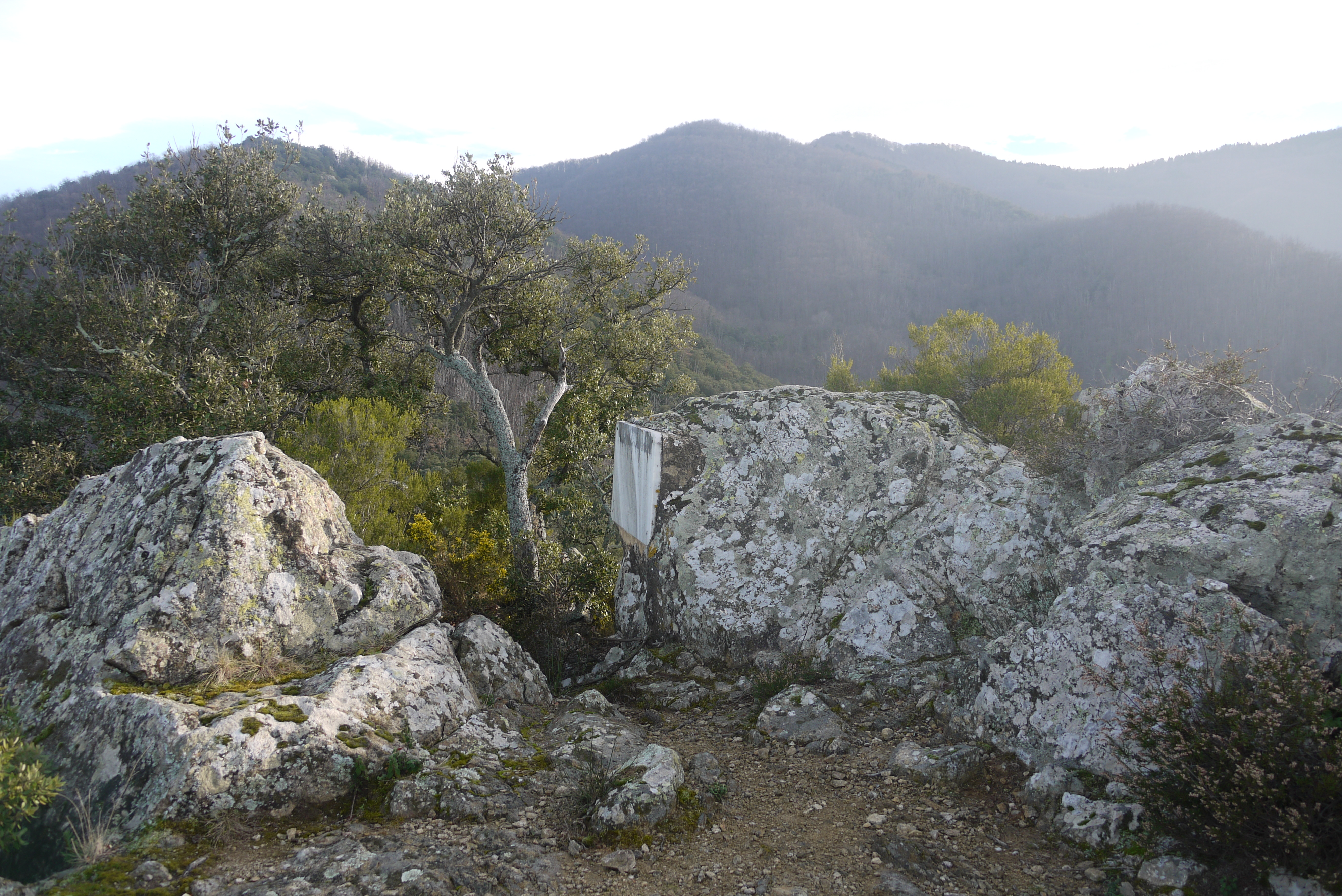 Sommet du Roc Famoso et vue sur le Puig de Miralles